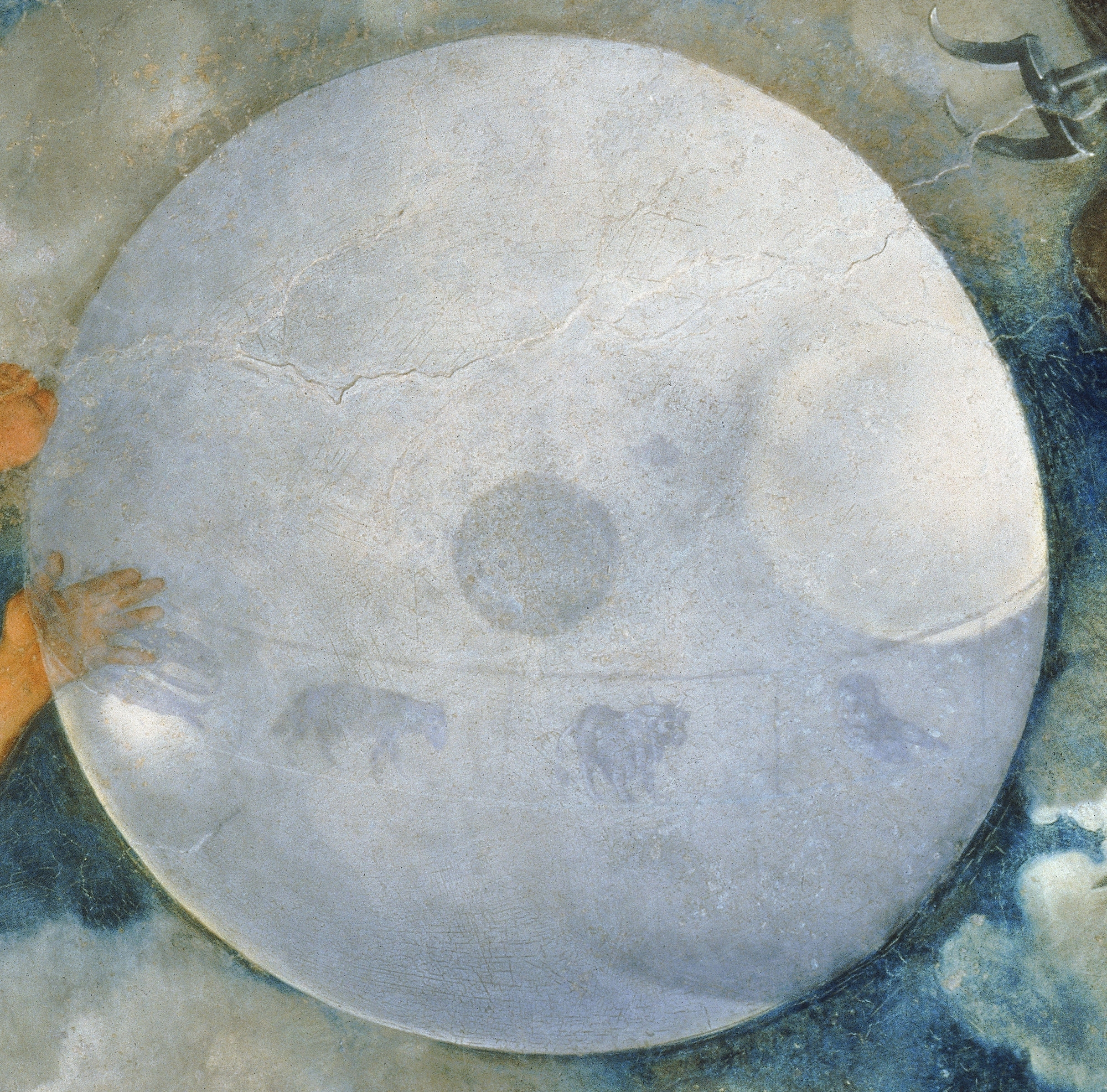 Détail de la fresque de Caravage (rotation -102°). Représentation d'une sphère céleste.